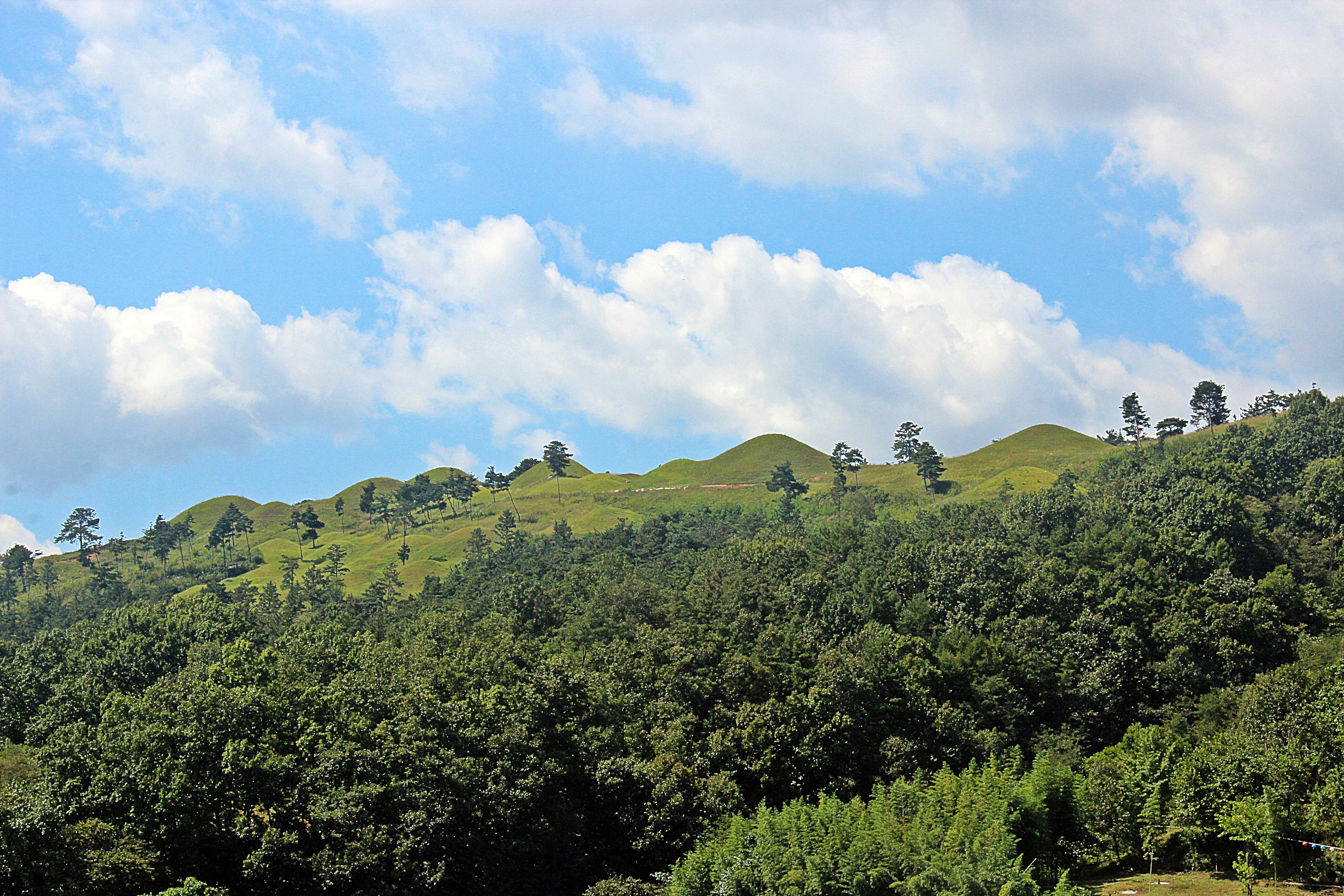 고령 지산동 고분군은 경북 고령군 가야읍에 있는 무덤군이며 대한민국 사적 제79호